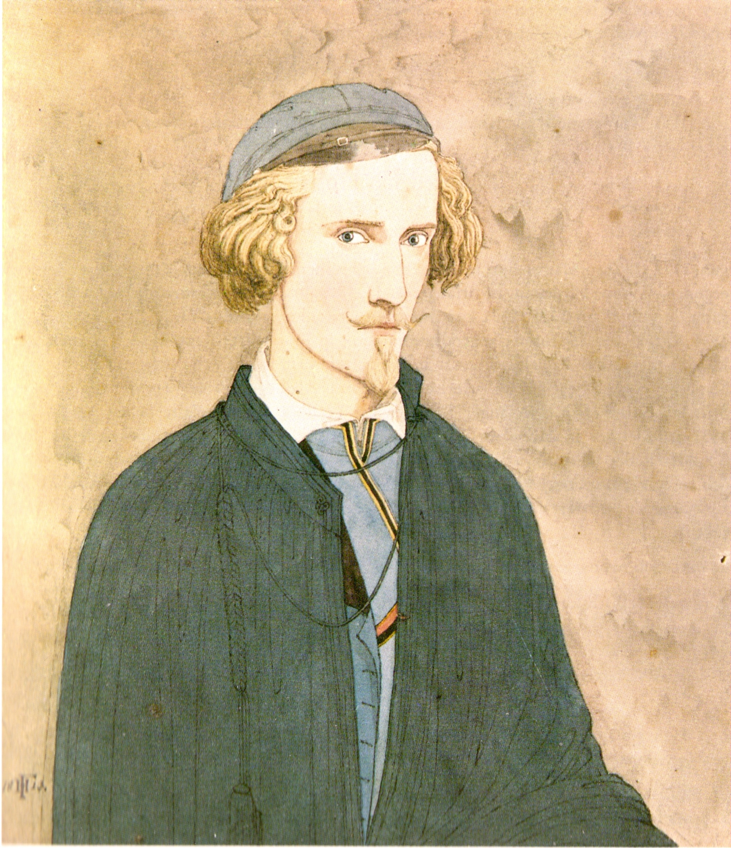 Selbstporträt des Friedrich Hoffstadt als Student in Erlangen. Hoffstadt war zunächst Mitglied der Verbindung Concordia Erlangen und trat dann zur Burschenschaft über. Aquarell 12x18 cm in seinem Stammbuch. Im Archiv der Familie von und zu Aufseß.